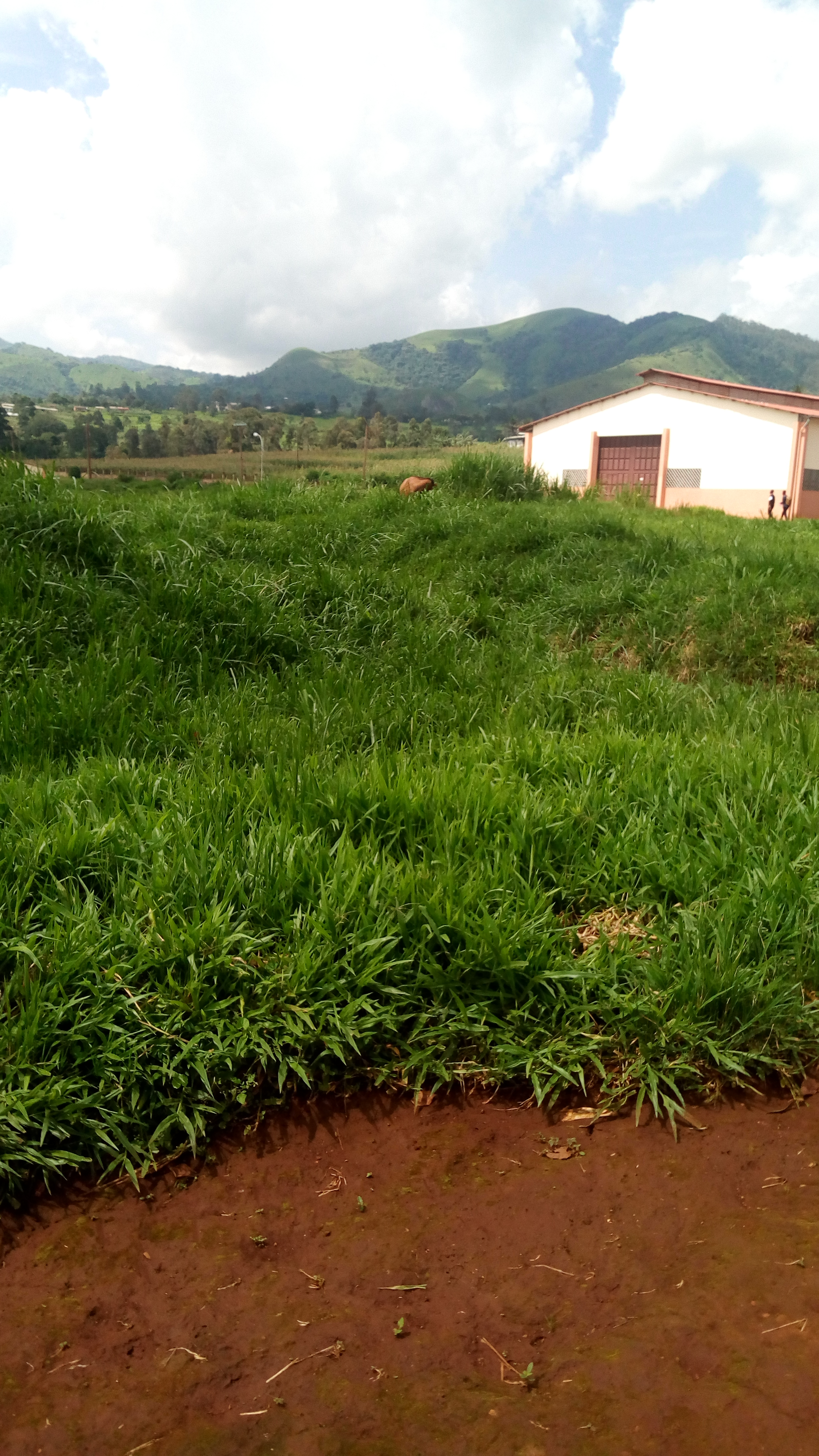 Mountain view from University of bamenda bambili campus. Northwest region